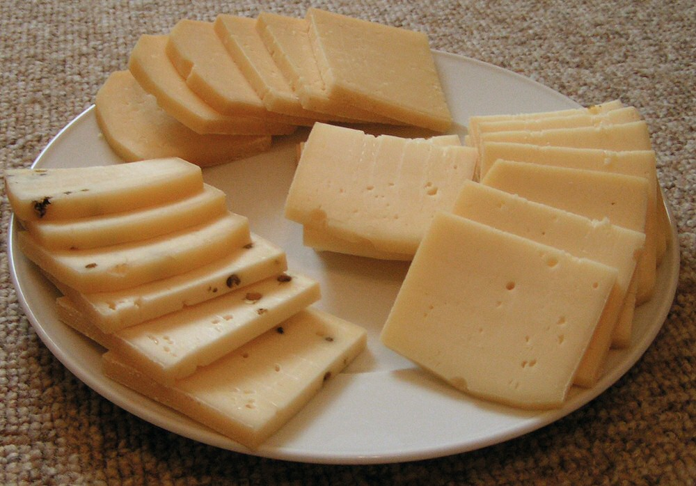 Raclette-Käse in Scheiben geschnitten (vorne links mit Pfeffer, vorne rechts mit Knoblauch, hinten traditionell)